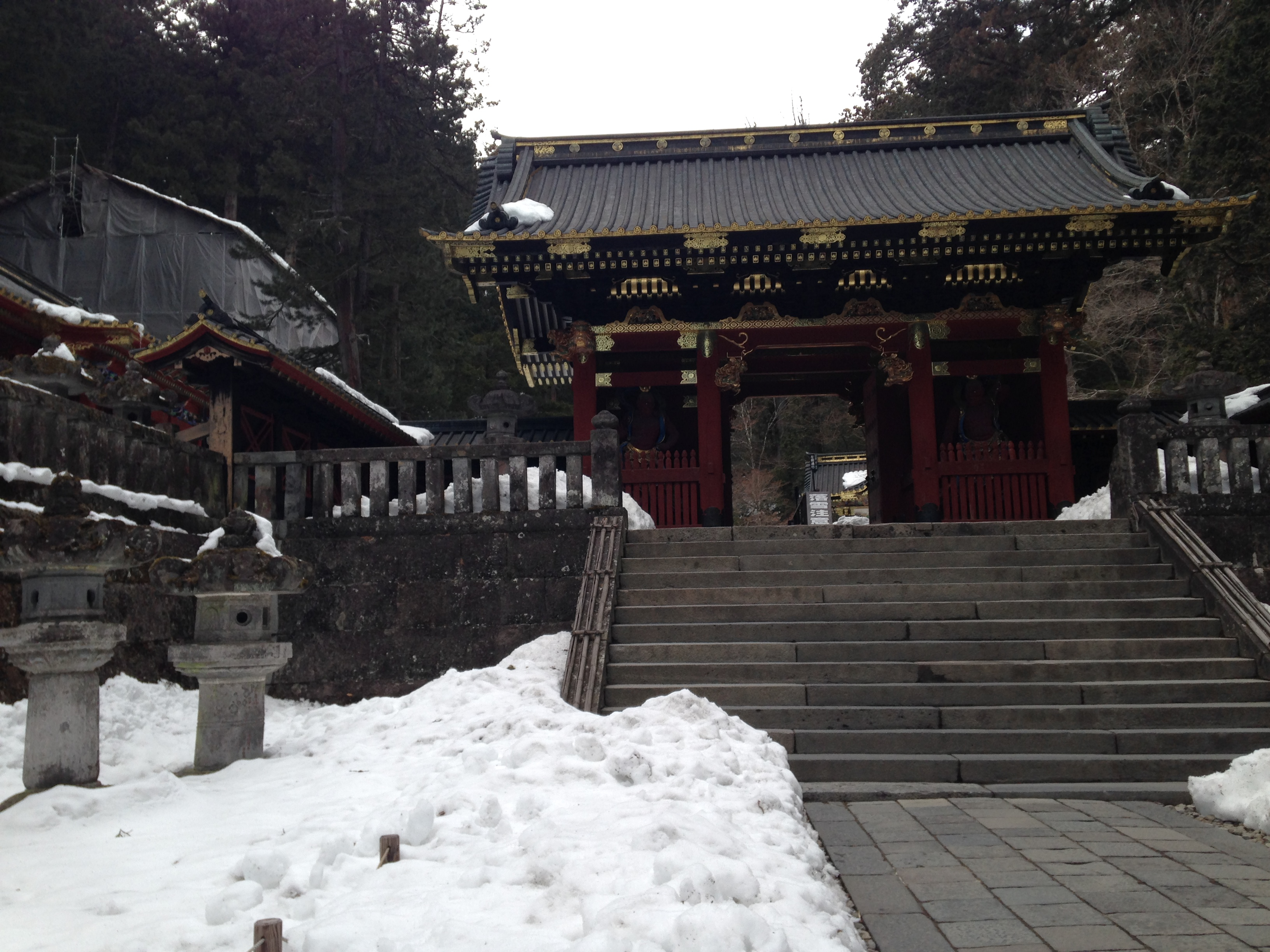 輪王寺大猷院霊廟・仁王門